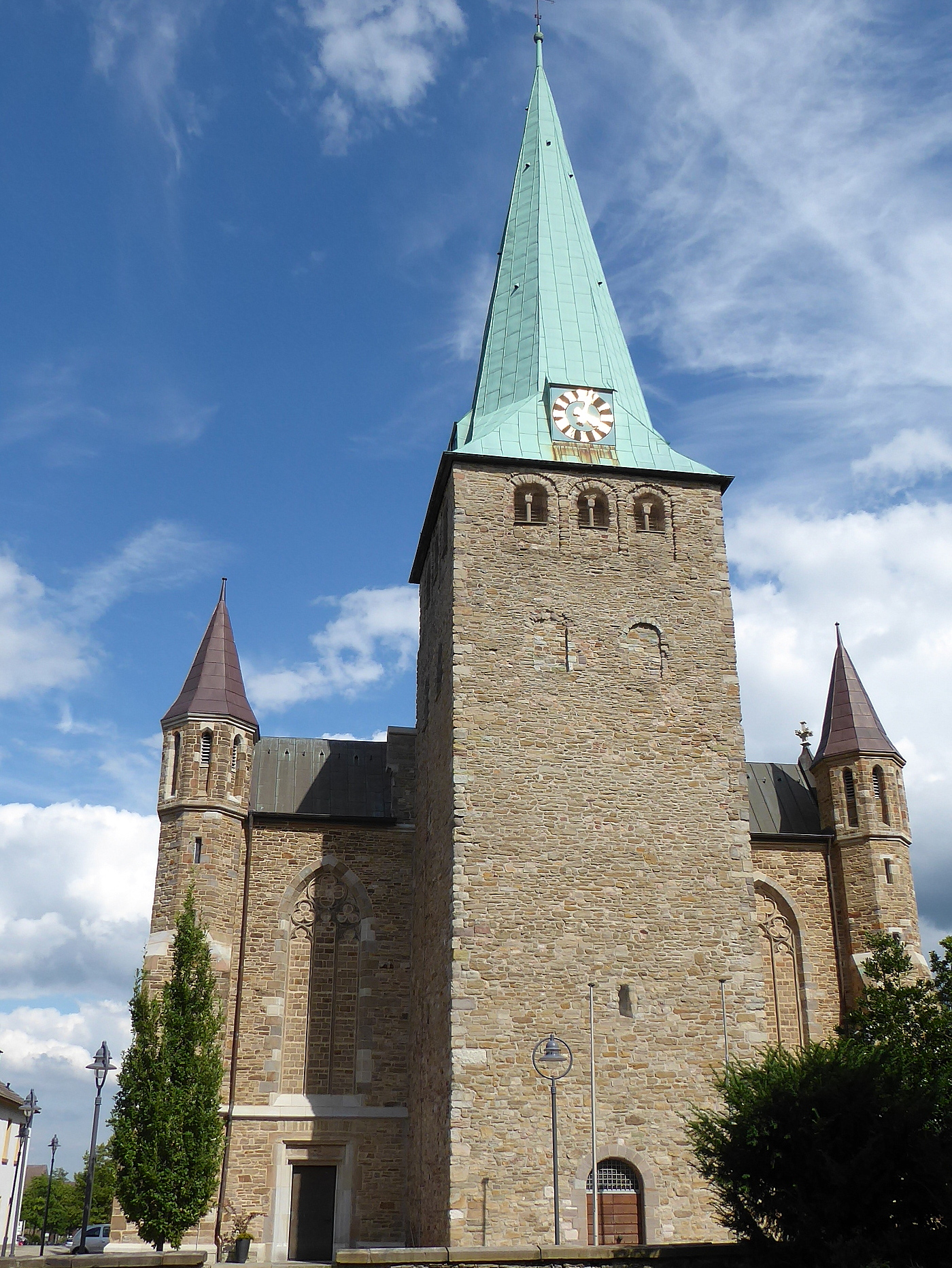 Umfassende Sanierung der Außenfassaden nach drei Jahren im Mai 2017 abgeschlossen. Westfassade